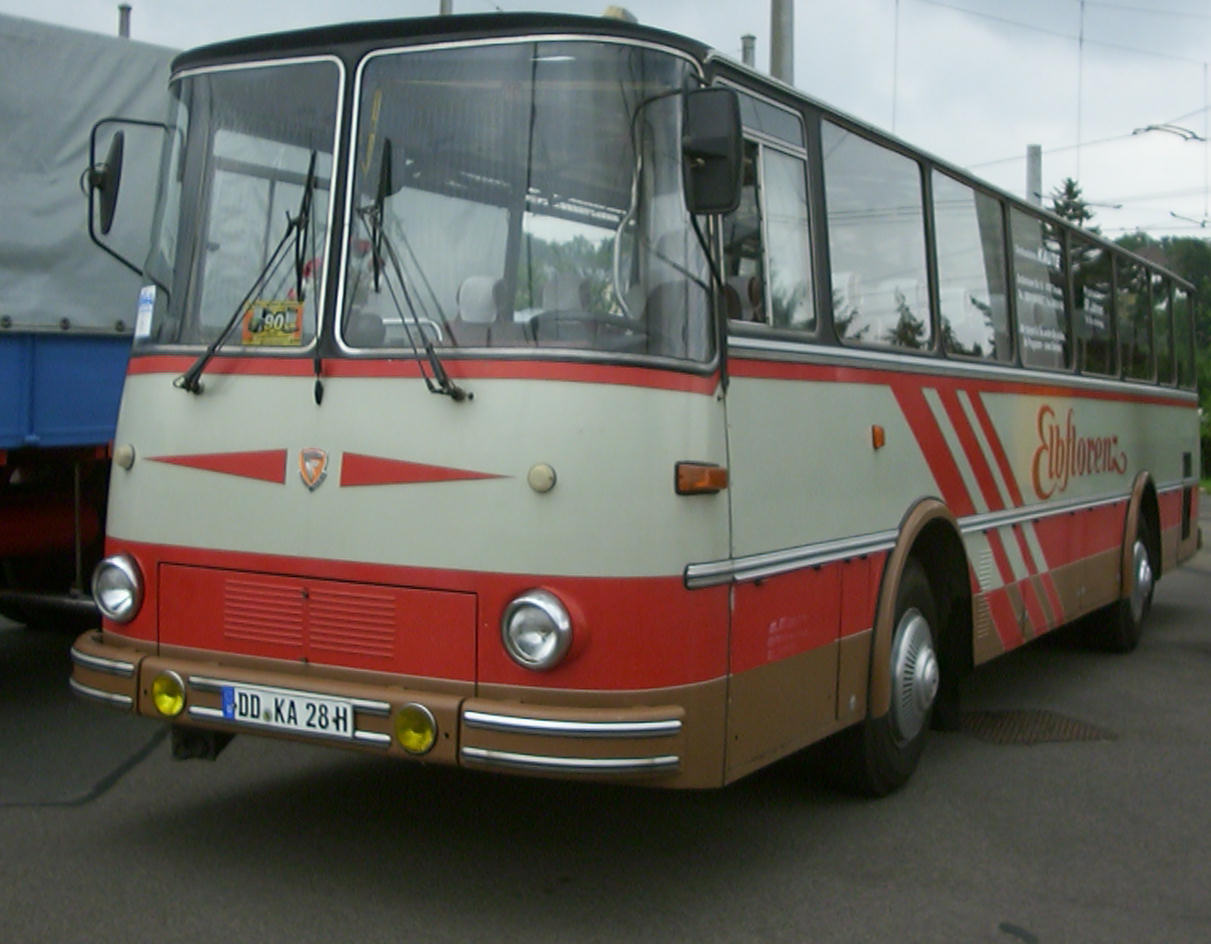 Fleischer S2 RU II – Bus „Elbflorenz“